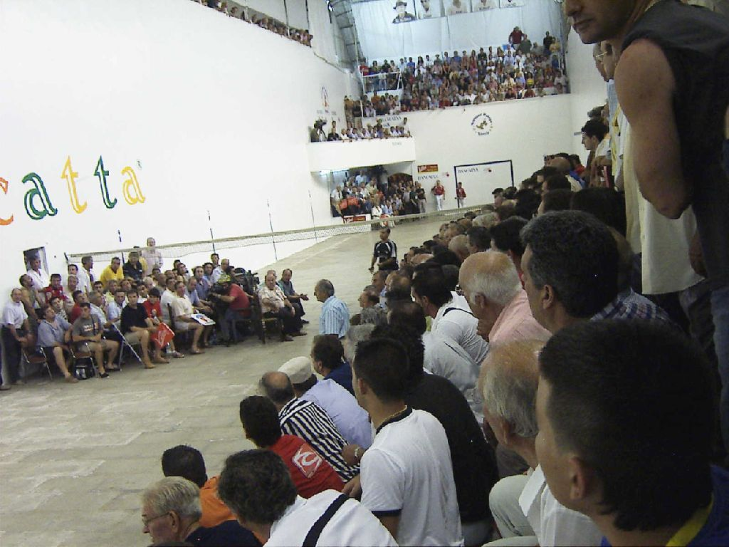 El trinquet de Pelayo durant la final del campionat individual d'escala i corda de l'any 2005